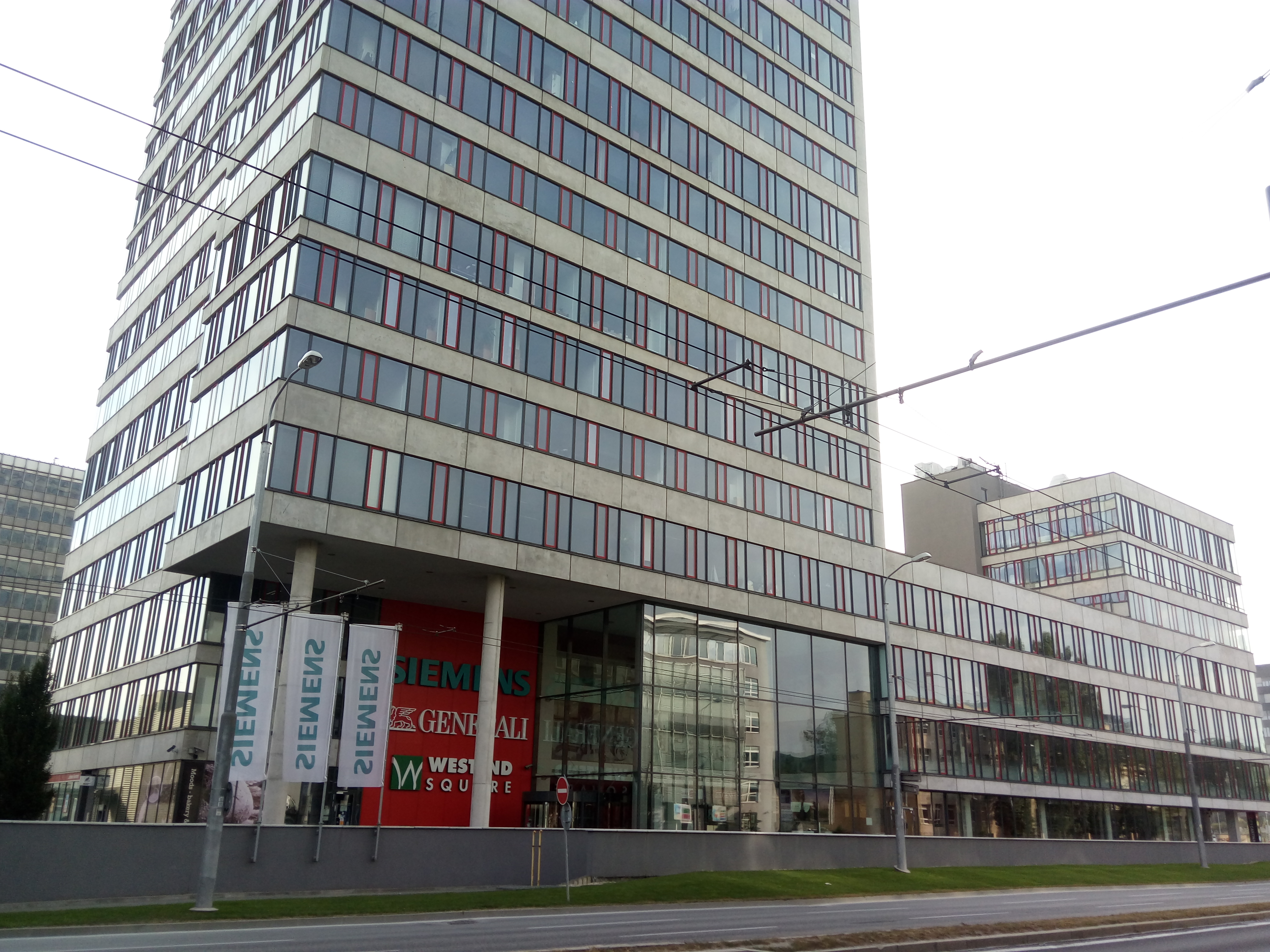 Patrónka, Bratislava